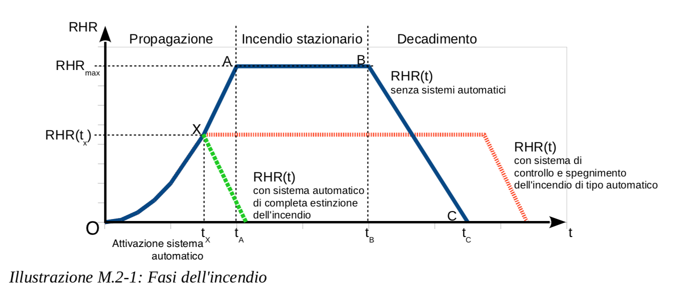 Stima della curva RHR in accordo al DM 03/08/2015